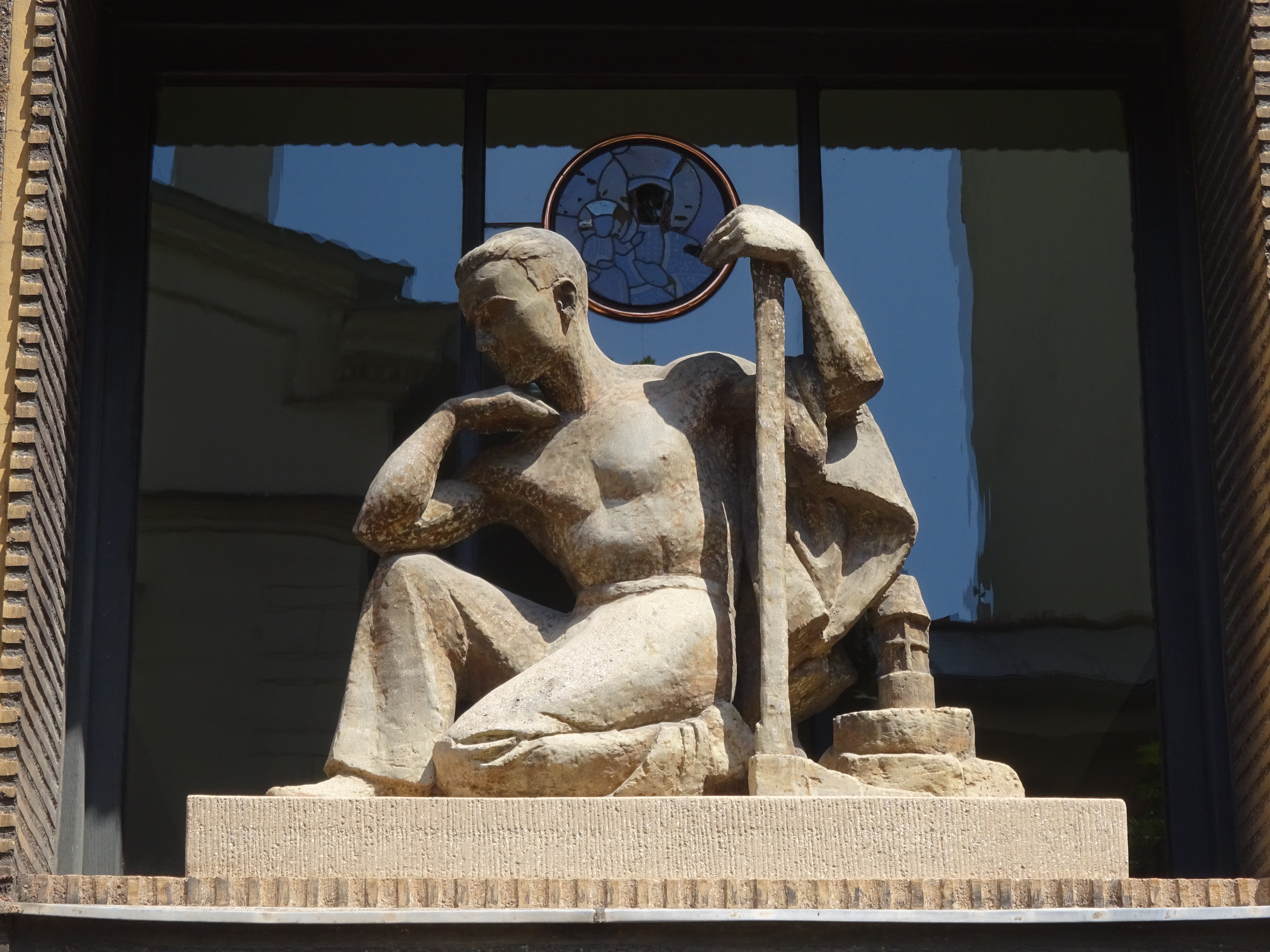 Rzeźba Górnika autorstwa Franciszka Kalfasa na Kamienicy Fabryki Ćmielów w Krakowie przy ulicy Biskupiej 9-11.